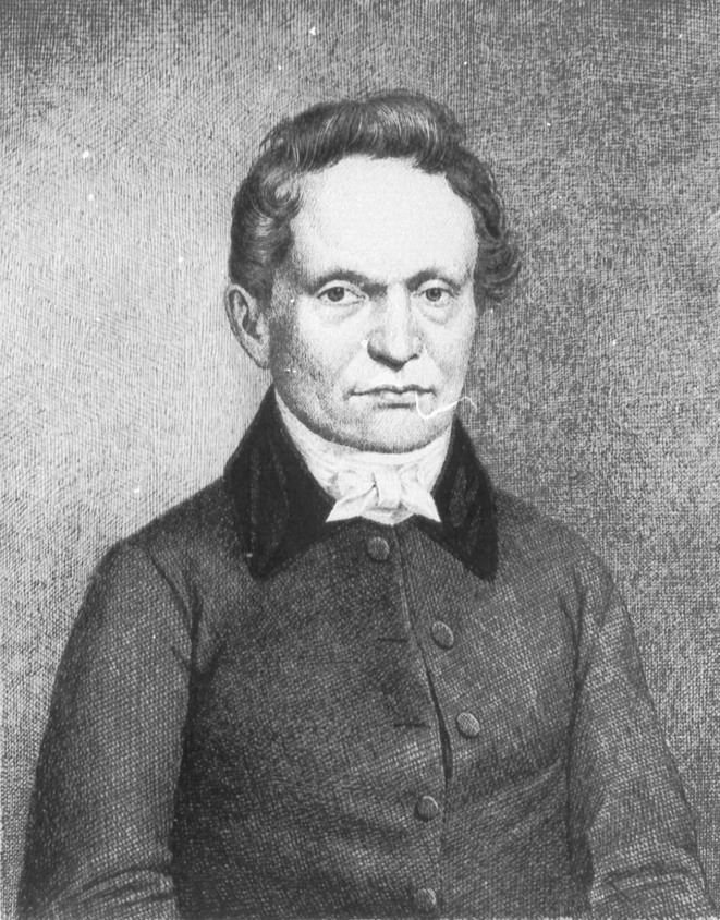 Hermann Christian Karl Friedrich Hupfeld (Federzeichnung von F. Justi)